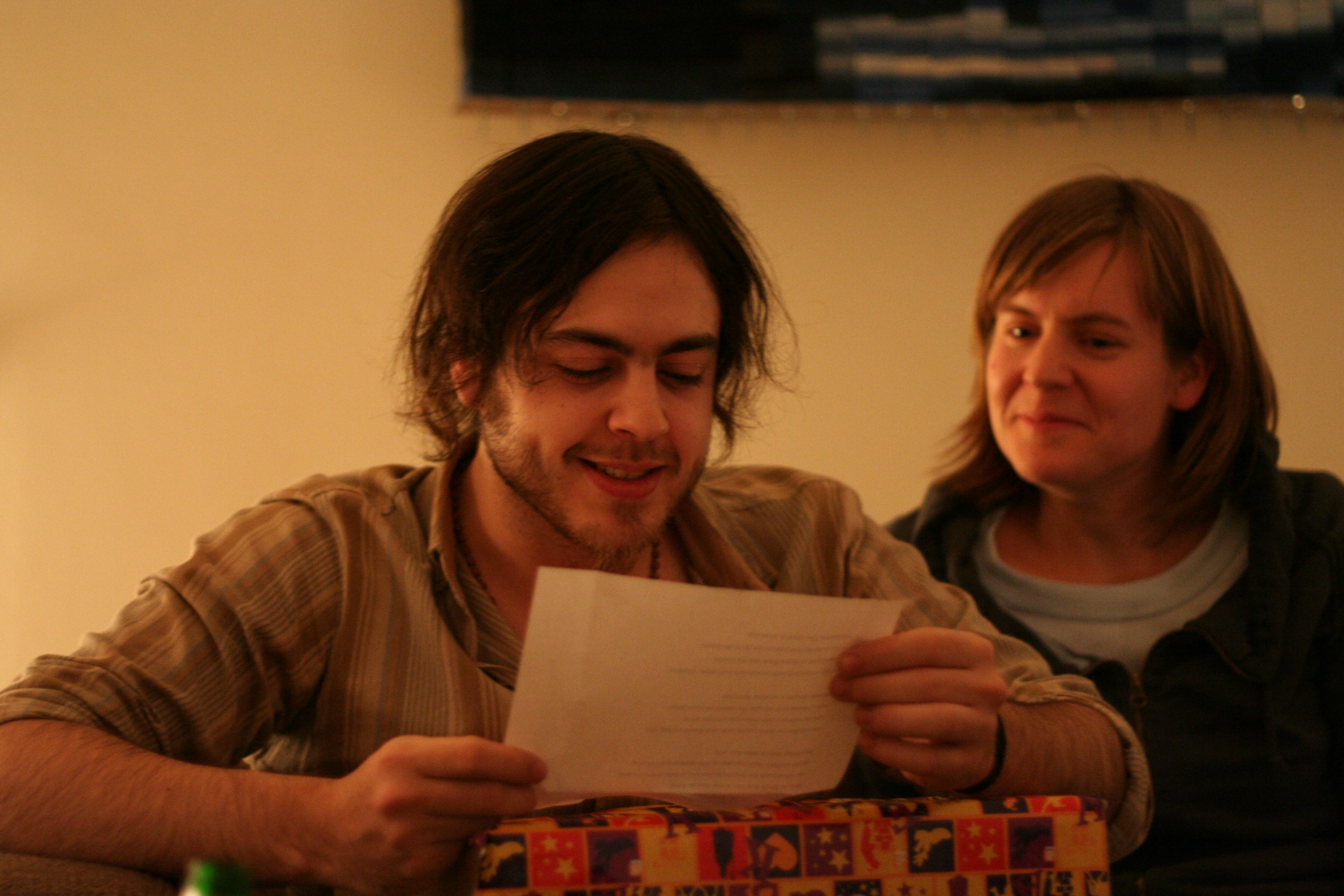 Sinterklaas C&O